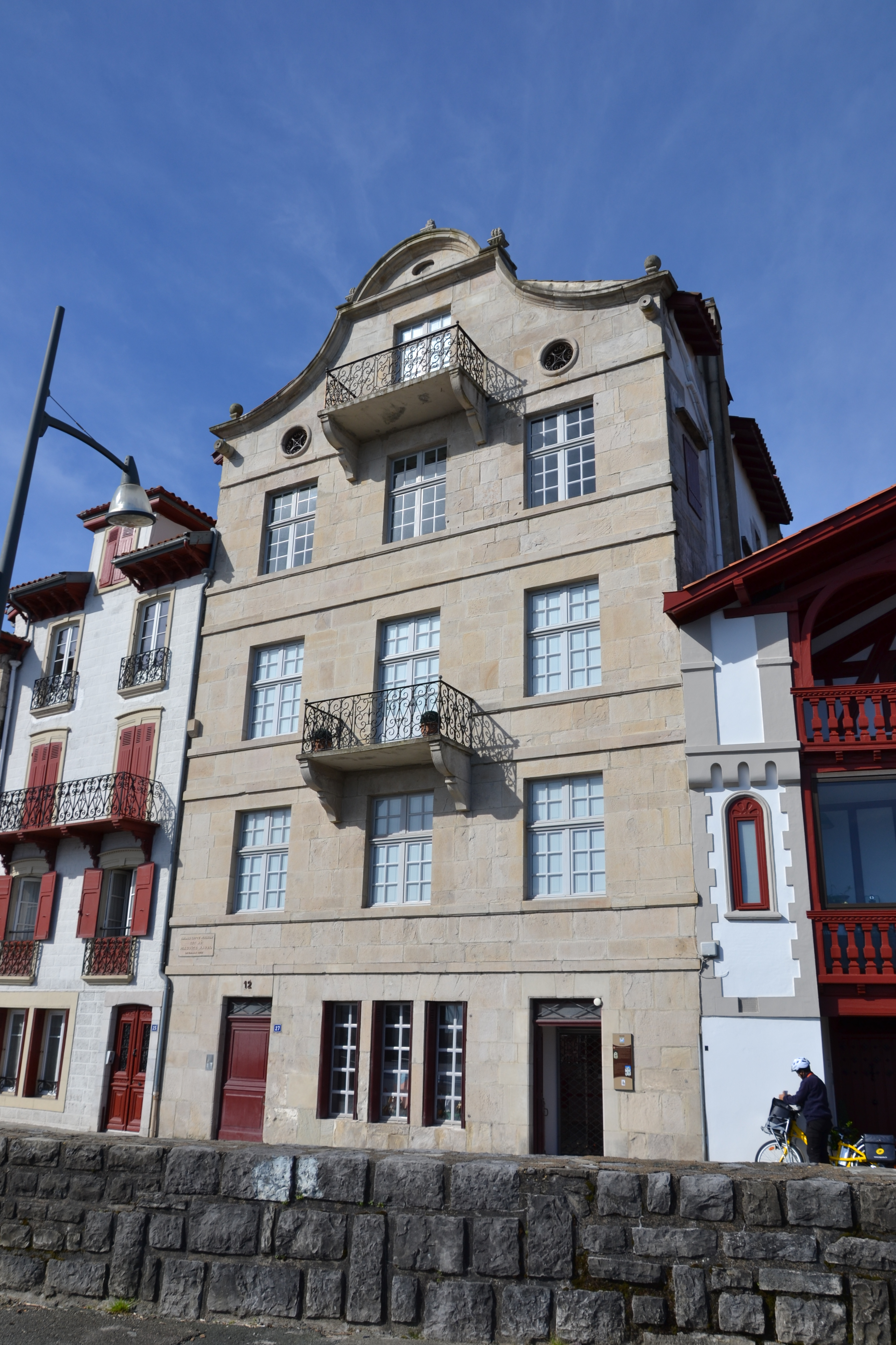 Maison natale Ravel à Ciboure